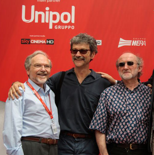 Josef Weiss, Silvio Soldini, Alberto Casiraghy. Documentario Il fiume ha sempre ragione. Biografilm Festival, 2016